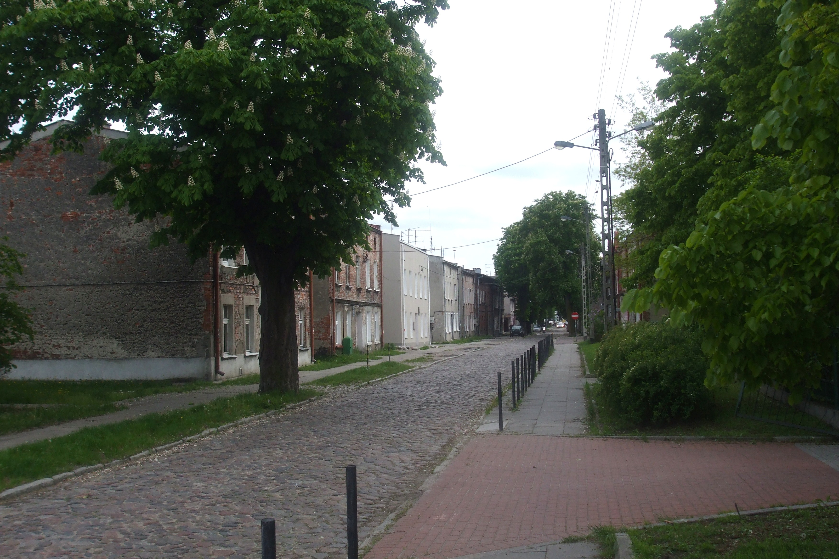 Gdańsk Letnica, ul. Starowiejska.